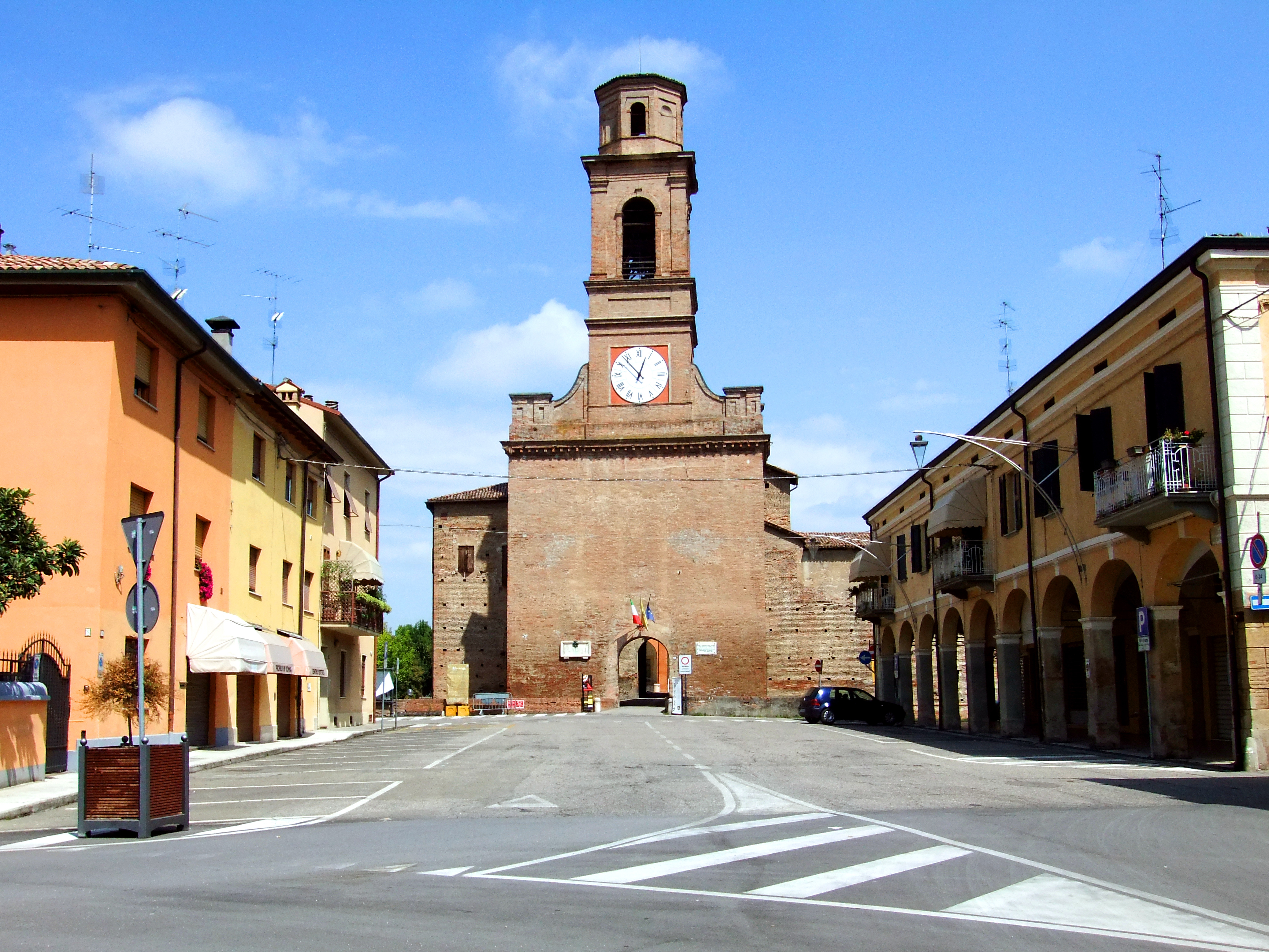 Piazzale antistante all'entrara della Rocca di Novellara